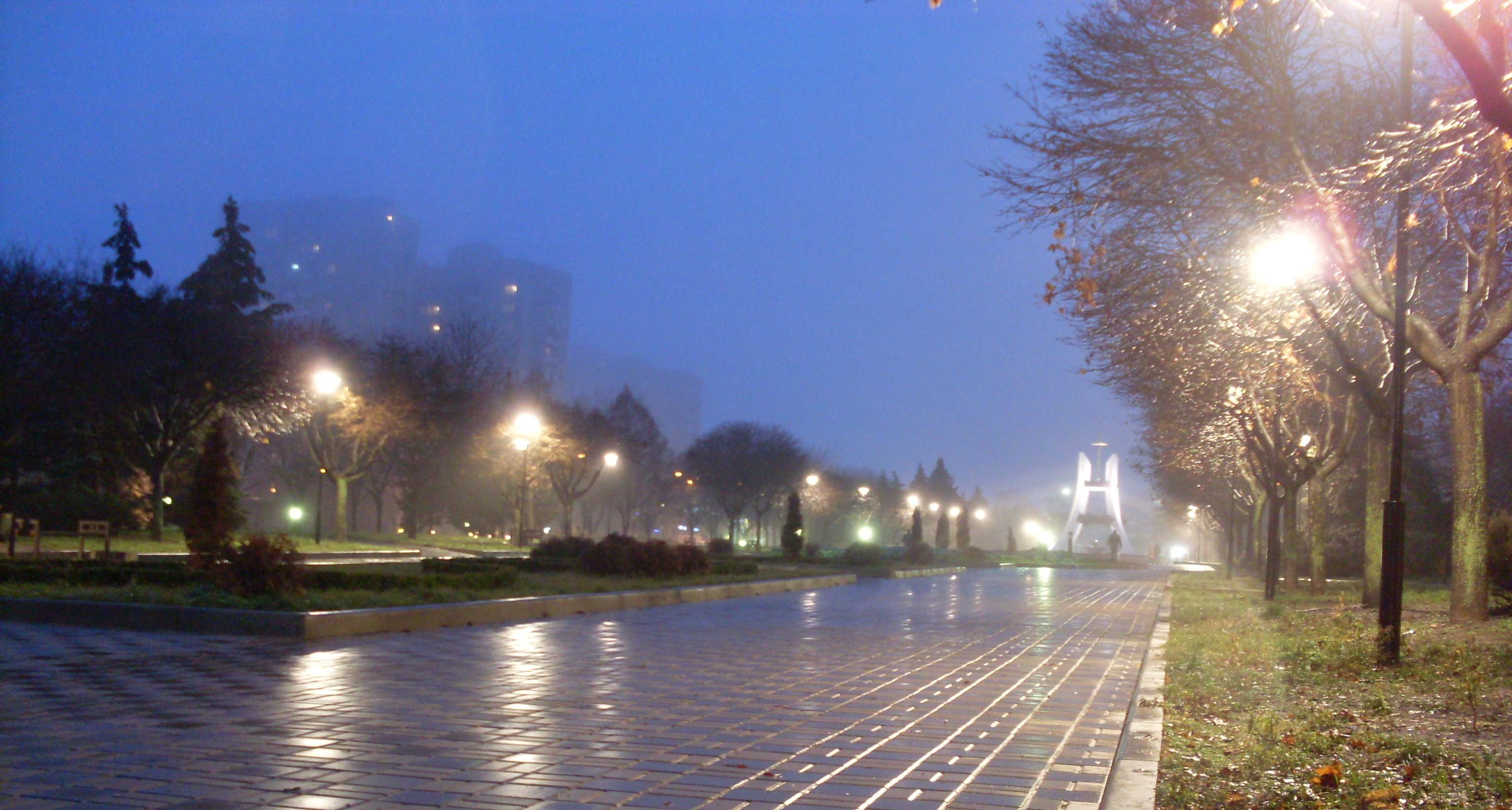 Vedere nocturnă a parcului „Feciorii Patriei” cu memorialul ridicat în cinstea celor căzuți în războiul din Afganistan. Fotografiat dinspre sud-est.